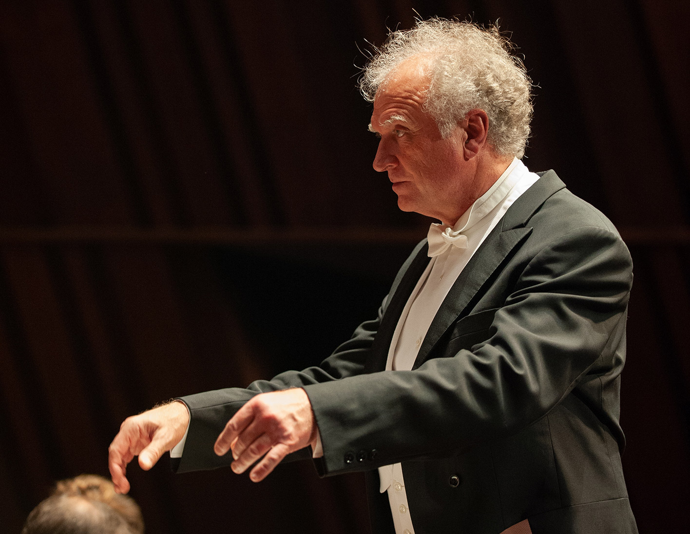 Ralf Otto, Philharmonie Luxembourg